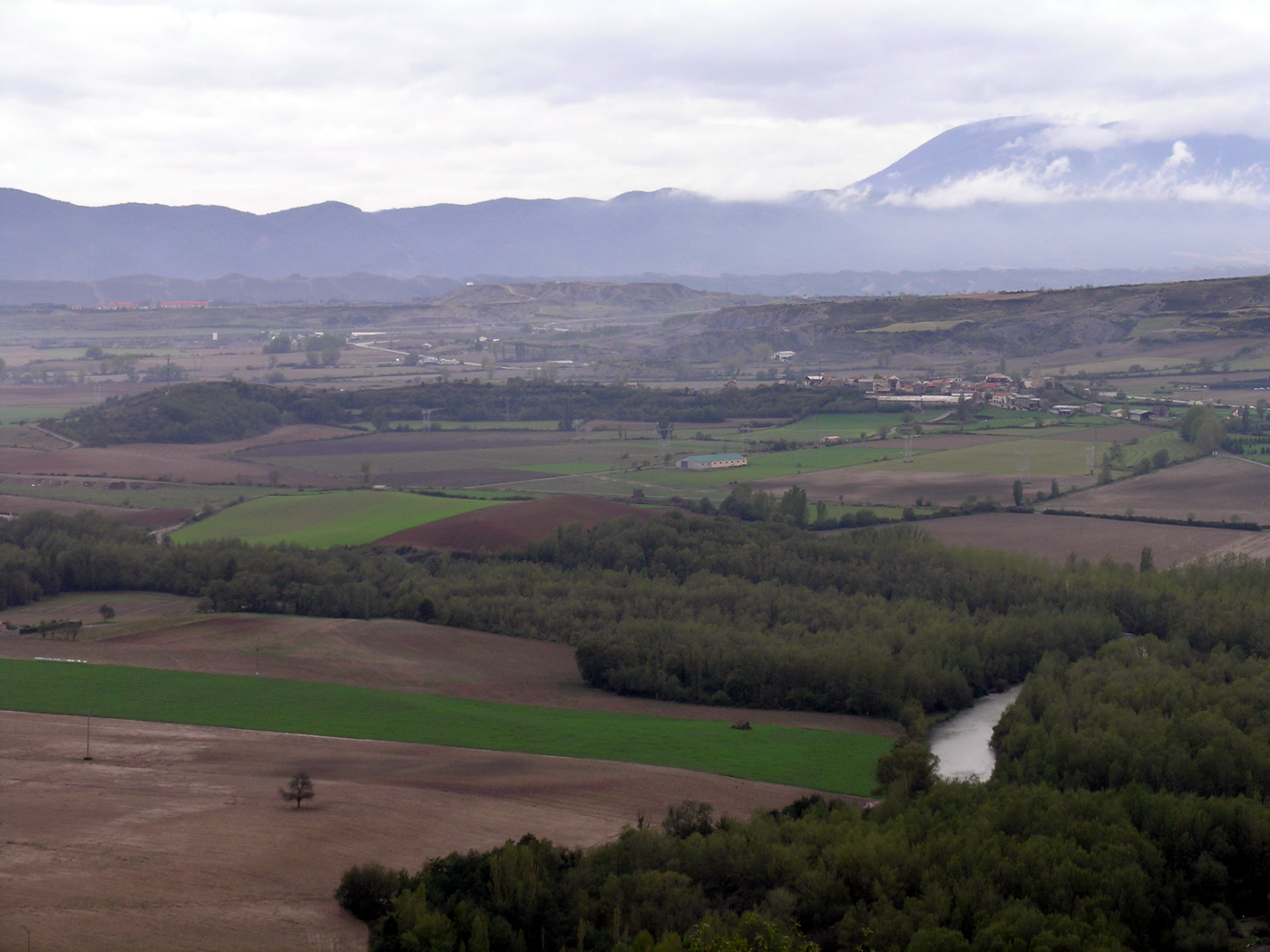 Fotografía de la morrena terminal del glaciar del valle de Tena, a la altura de Senegüé (Huesca)